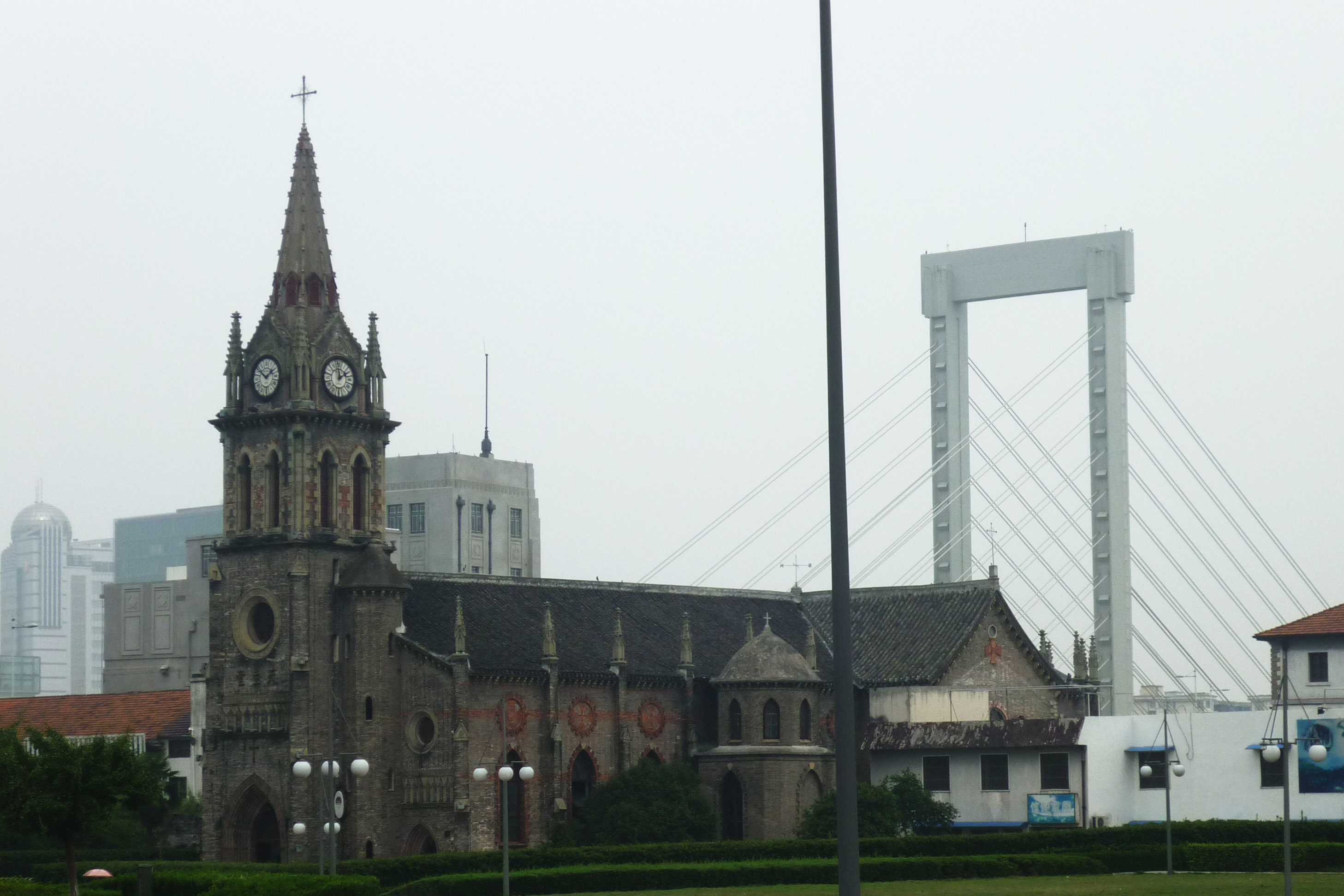 宁波天主教堂